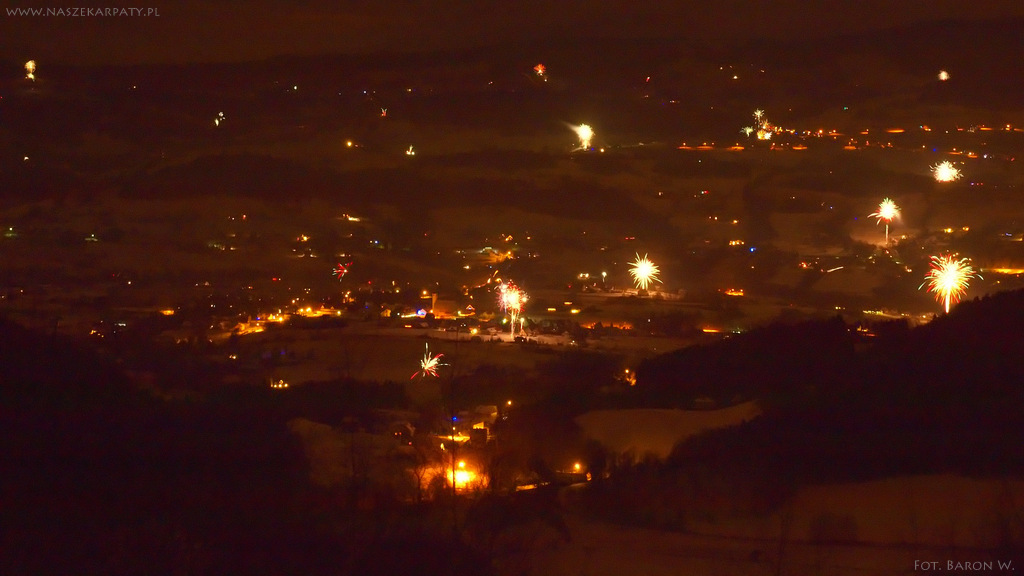 Nocny widok z szczytu Sałasz.